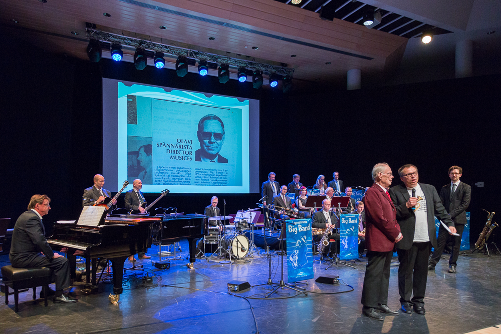 Petri Kivimäki haastattelee Olavi Spännäriä Lappeenranta Big Bandin 60- vuotis juhlakonsertissa 1.11.2015 Lappeenranta-salissa.